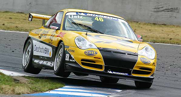 Richard Lietz im Porsche 997 GT3 Cup in Oschersleben 2005.